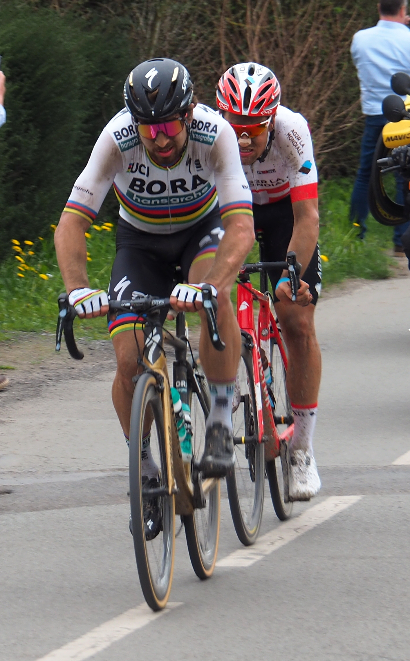 Paris Roubaix 2018, Peter Sagan et Silvan Dillier à 8 kilomètres de l'arrivée